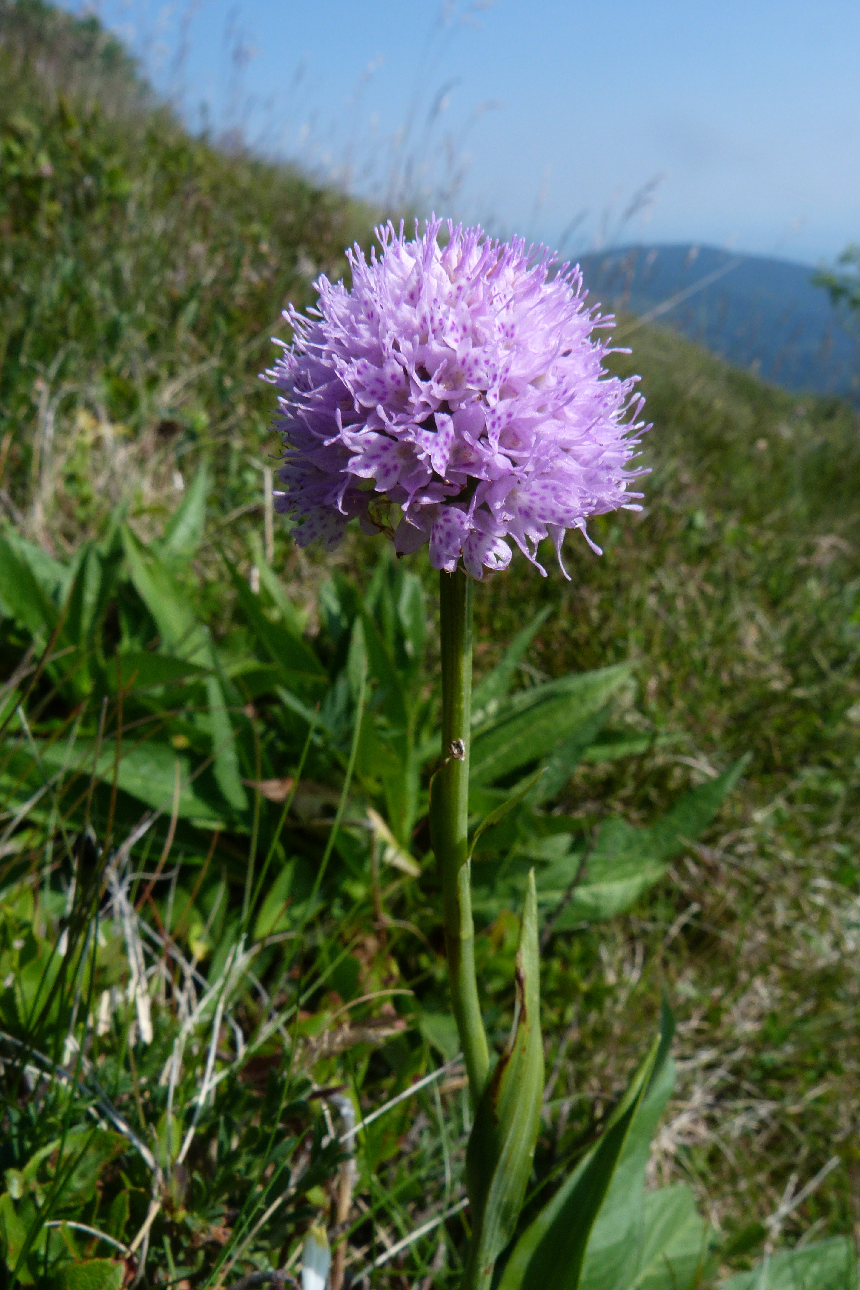 Orchis globuleux (Traunsteinera globosa) vers le Grand Ballon (massif des Vosges).